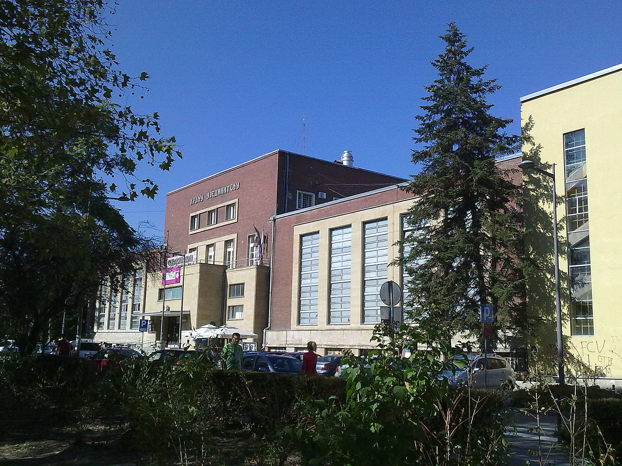 Danas se u ovoj zgradi nalazi Pozorište mladih.